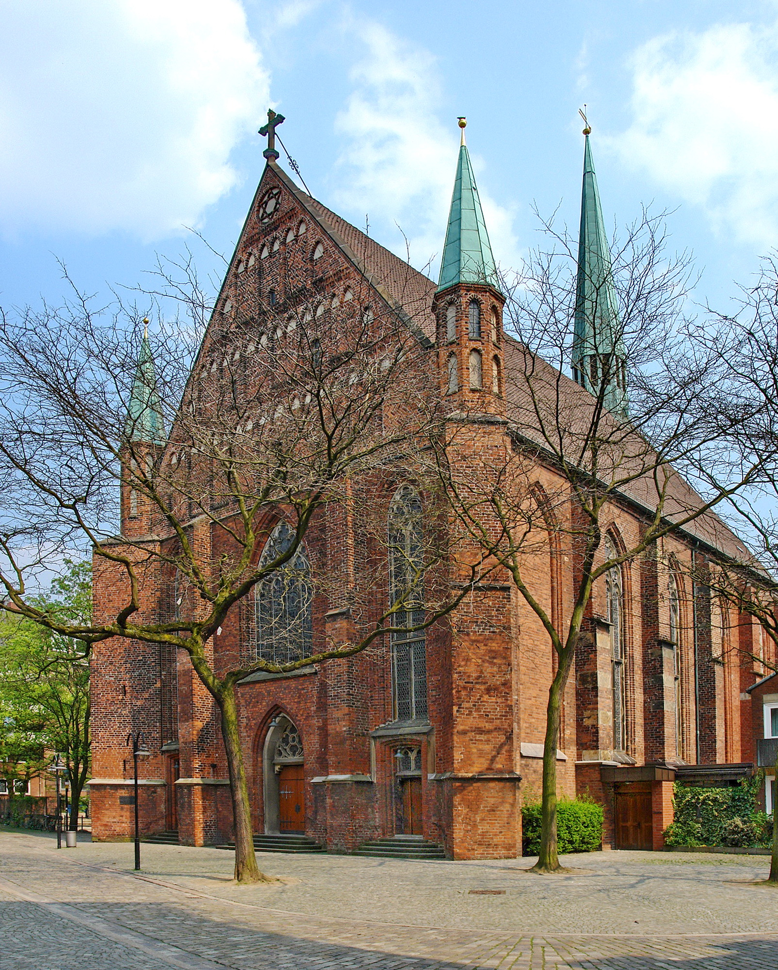 Propsteikirche St. Johann in BremenDas abgebildete Objekt ist ein geschütztes Kulturdenkmal in der Freien Hansestadt Bremen, mit der Nr. 0681,T beim Landesamt für Denkmalpflege registriert.